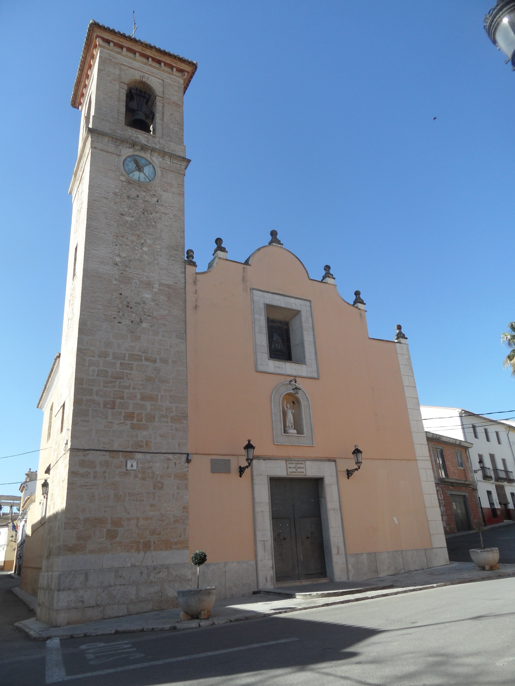 Església de Llanera de Ranes.